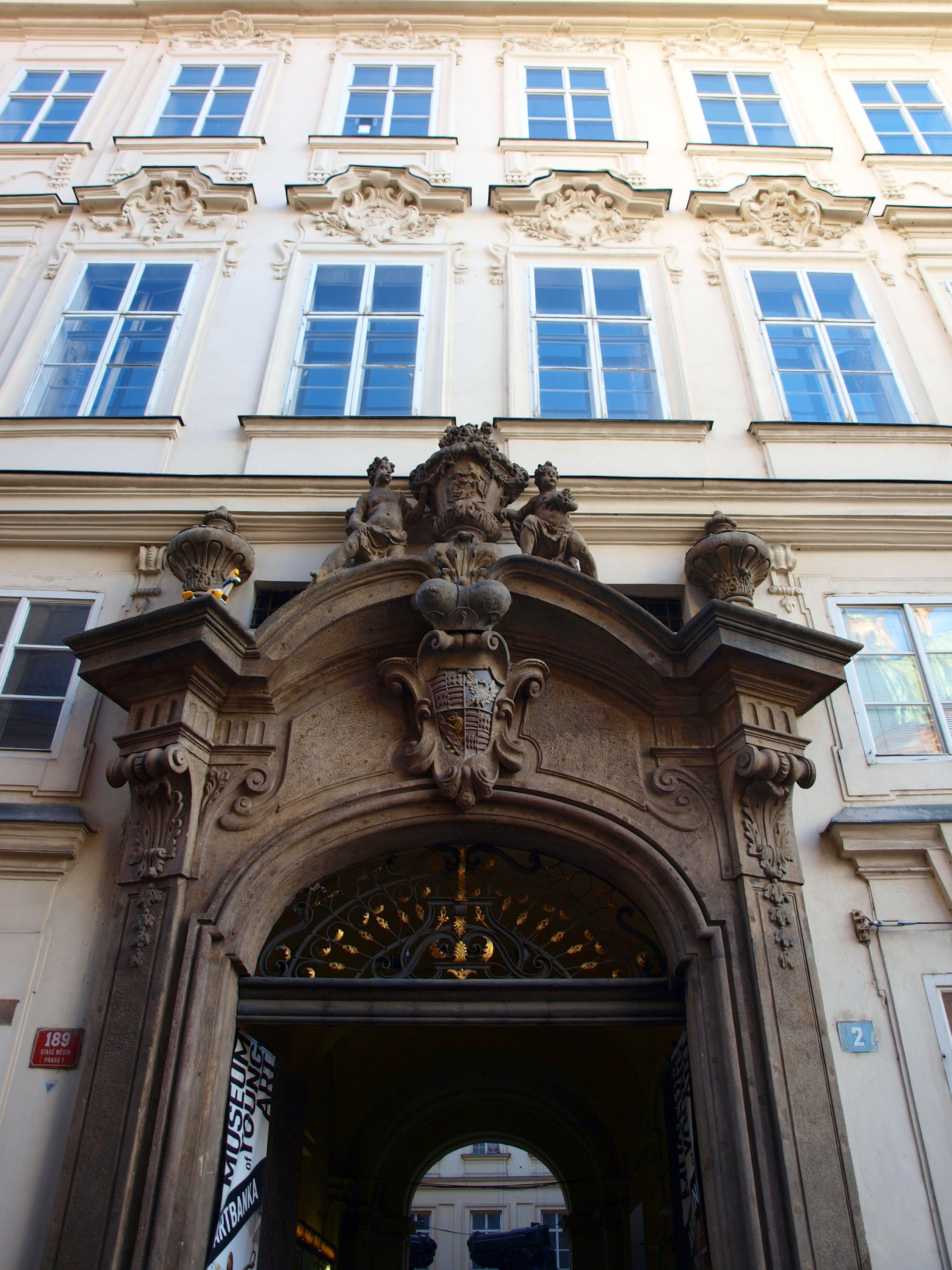 Palác Colloredo-Mansfeld